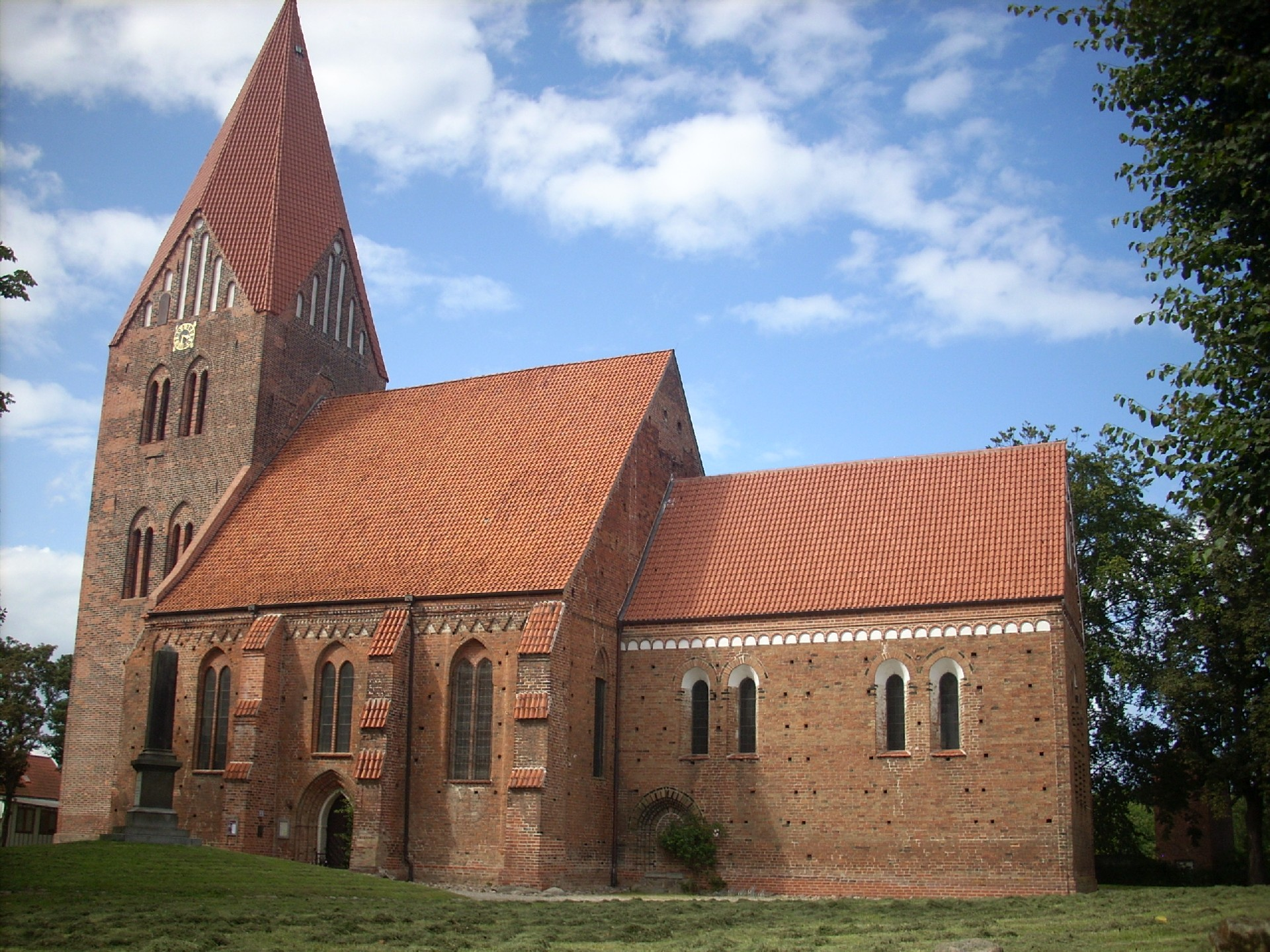 Klütz, St. Marien Lutheran Church